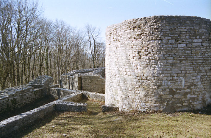 Ruine Bischofstein, Sissach, Eingangsbereich und Turm